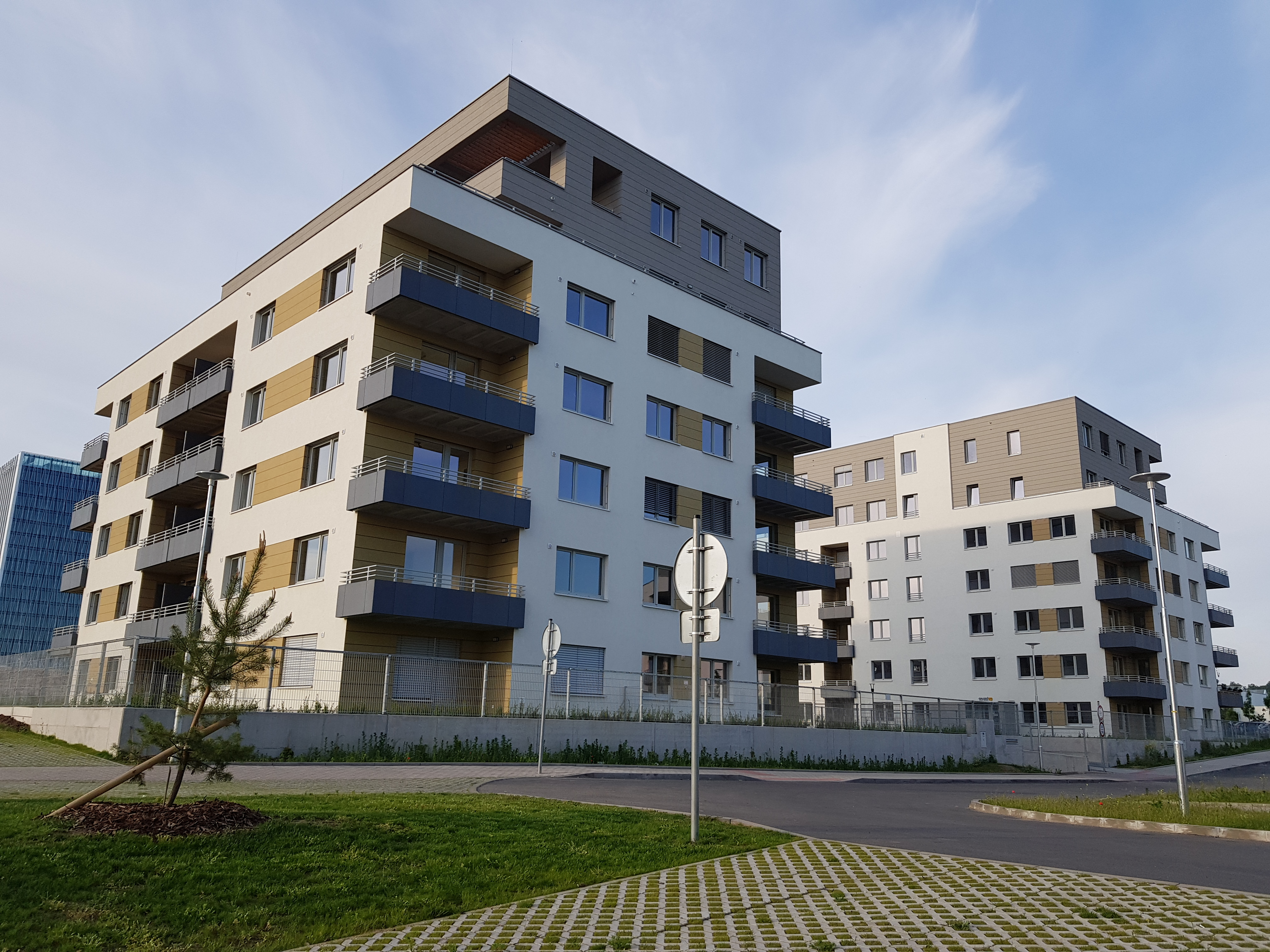 Vpravo dům Greta, ul. Svatošových čp. 1018/13 a vlevo dům Lilly čp. 1018/11, součást developerského projektu Čtvrť Emila Kolbena, Praha 9-Vysočany